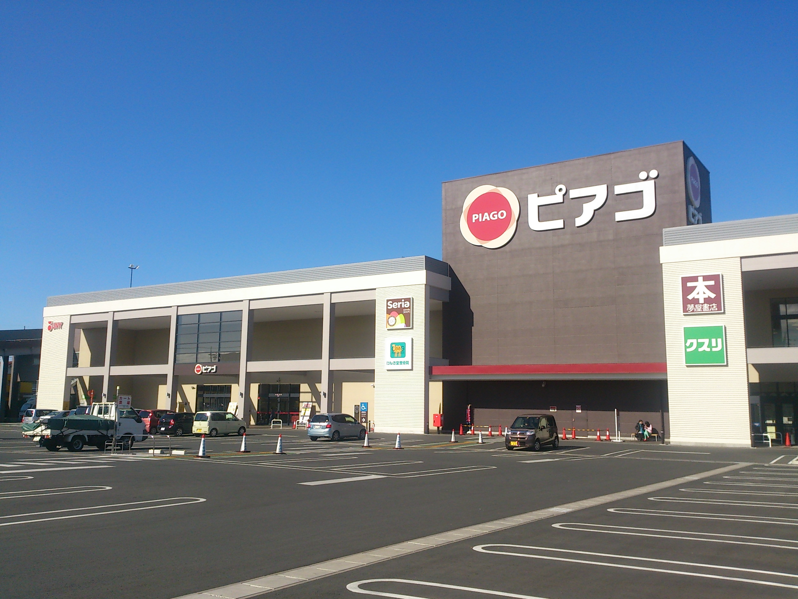 ピアゴ浜松泉町店外観